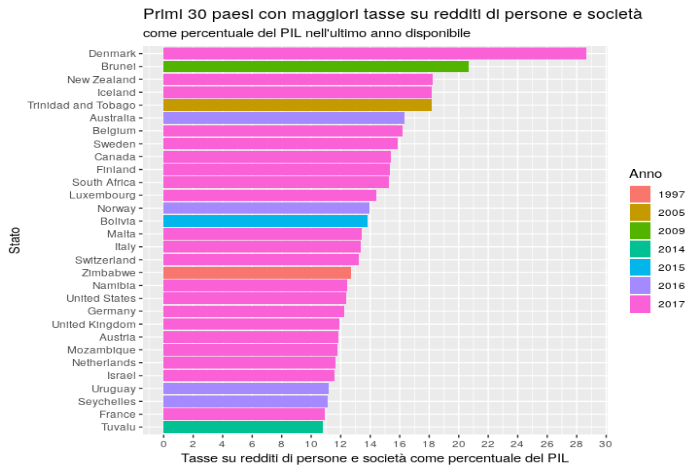 file realizzato con Rstudio con i seguenti dati